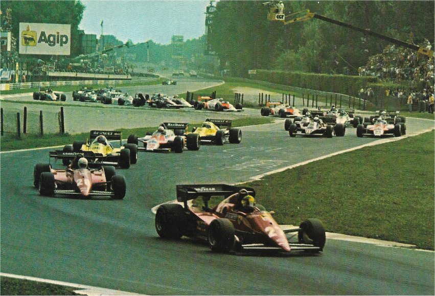 Autodromo Nazionale di Monza - Gran Premio 1987